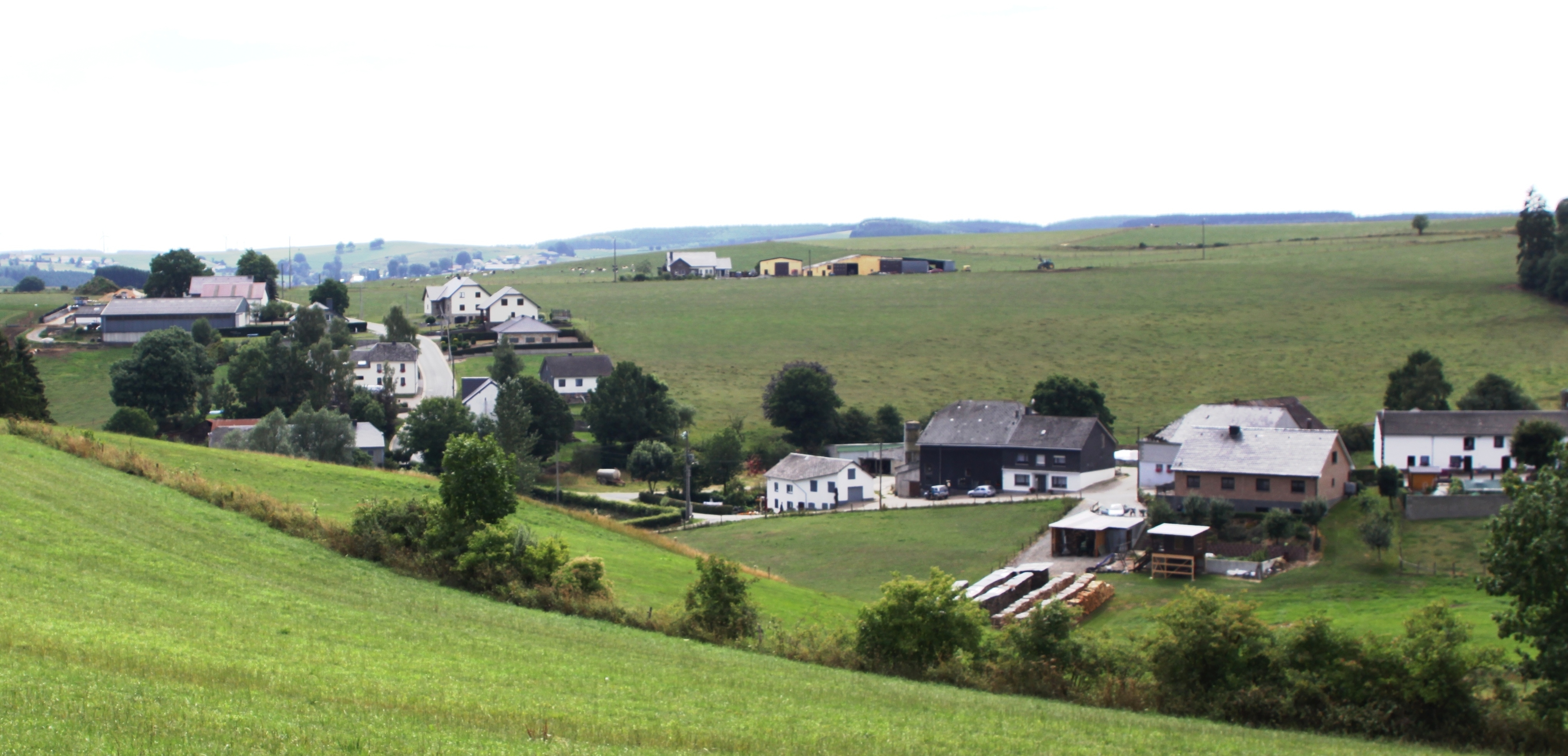 Le village d'Alster, commune de Burg-Reuland, Province de Liège